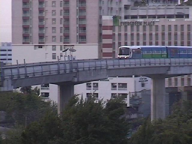 רכבת פרברית עילית. זכויות היוצרים שייכות לי.